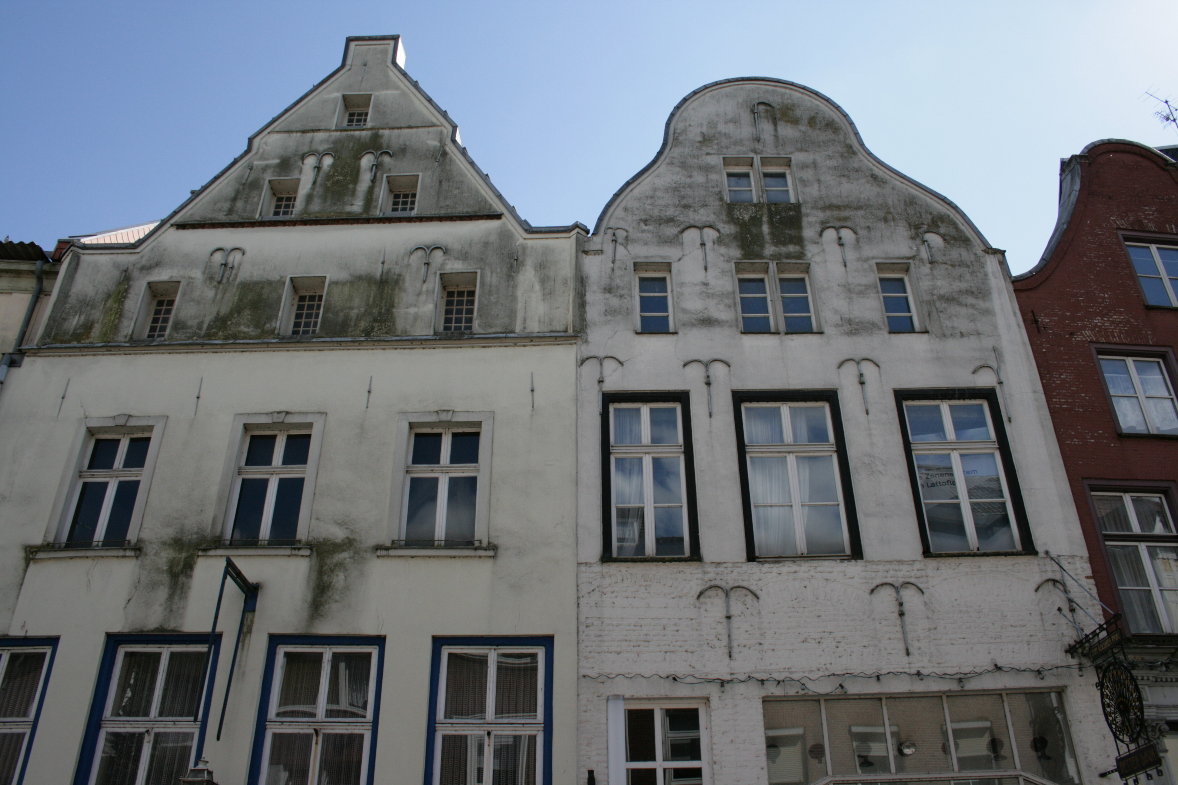 Steinstraße 15 und 17 in Emmerich am Rhein